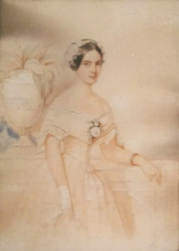 Графиня Анна Алексеевна Баранова, ур. Васильчикова (1823-1890), с 1845 года жена П.Т.Баранова.